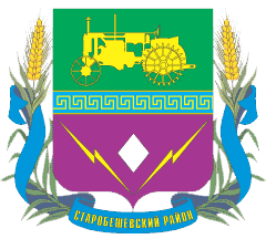 Герб Старобешівського району